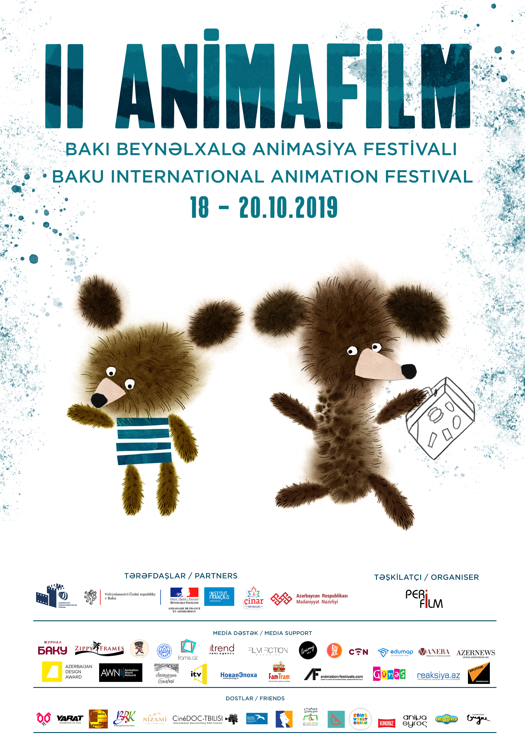 II ANİMAFİLM (2019) poster